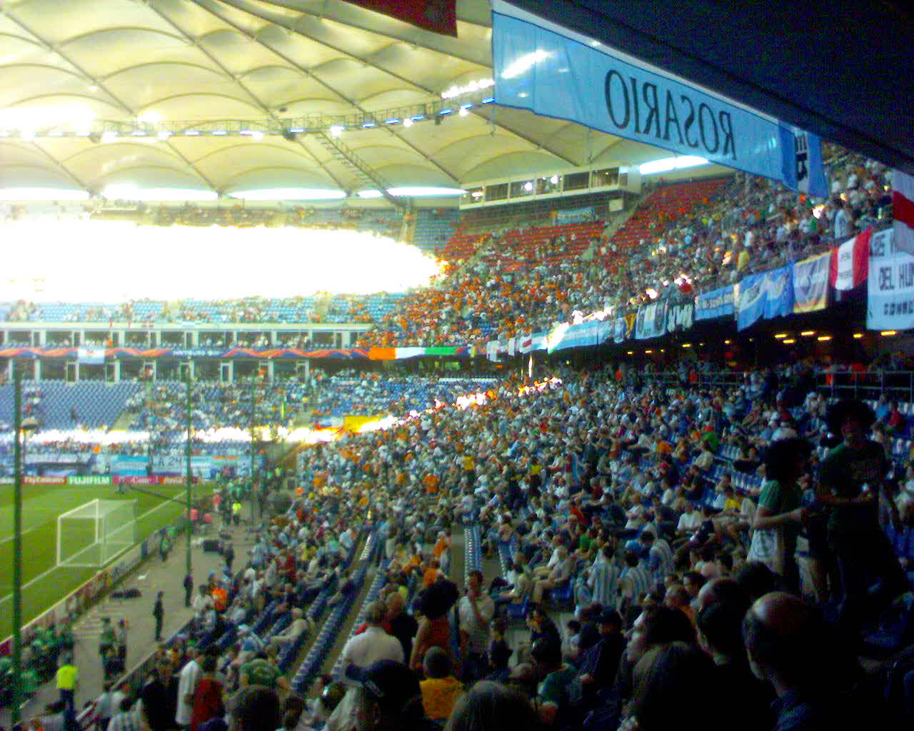 HSH Nordbank Arena zur FIFA Weltmeisterschaft 2006: Argentinien - Elfenbeinküste